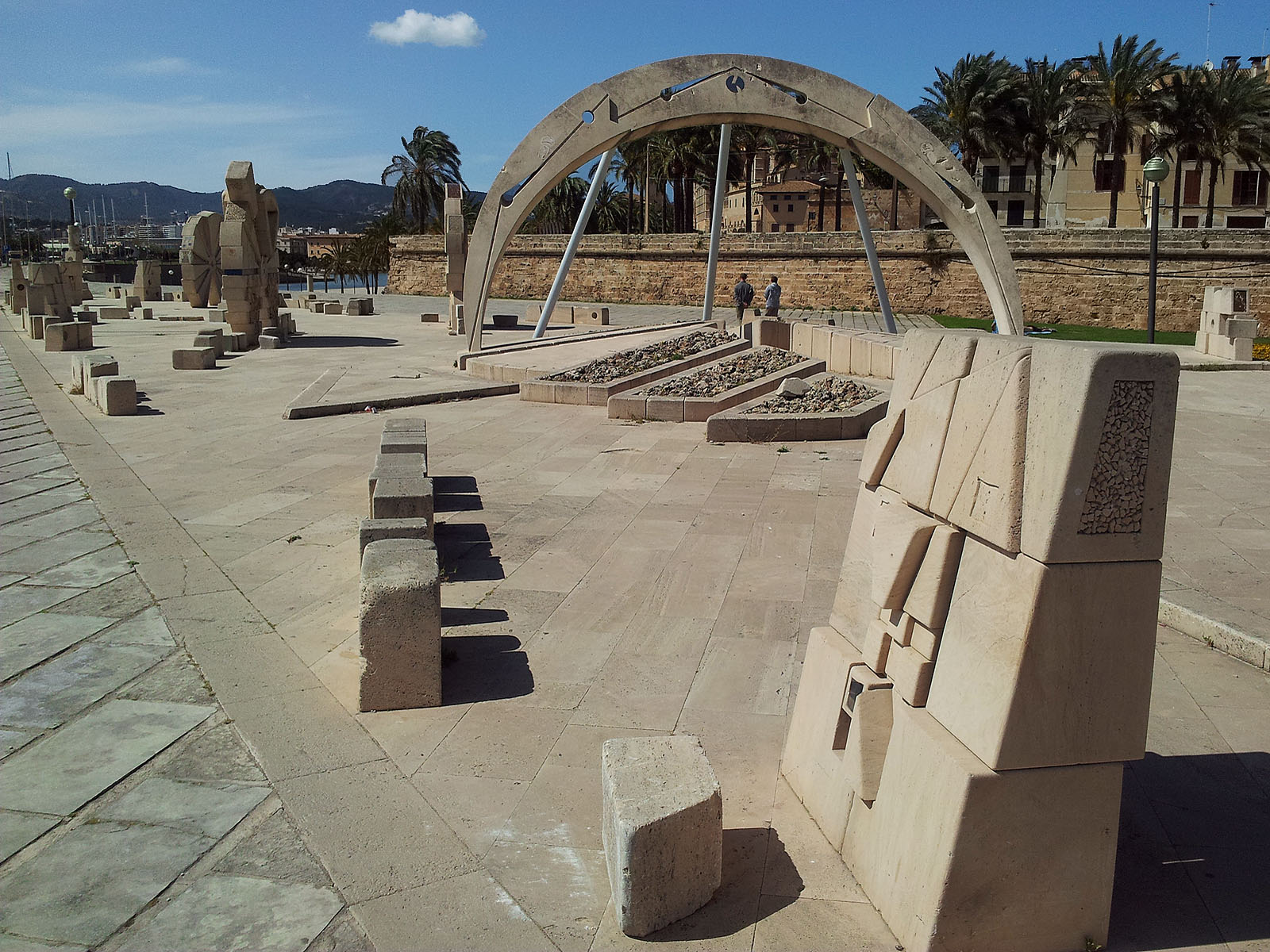 Josep Guinovart, untitled, 1985/86, Palma de Mallorca, Parc de la Mar